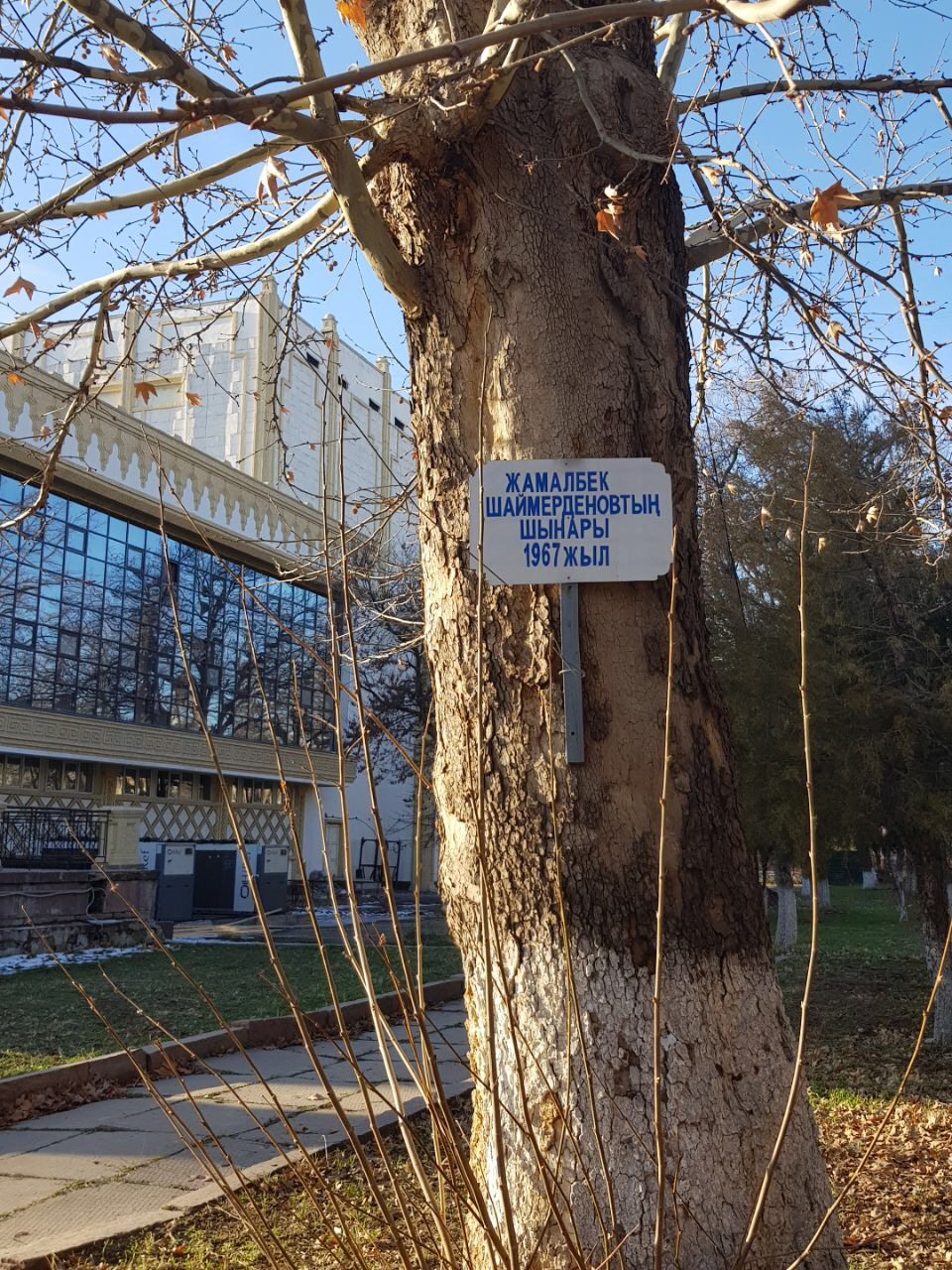 Дендрапарк г.Шымкент